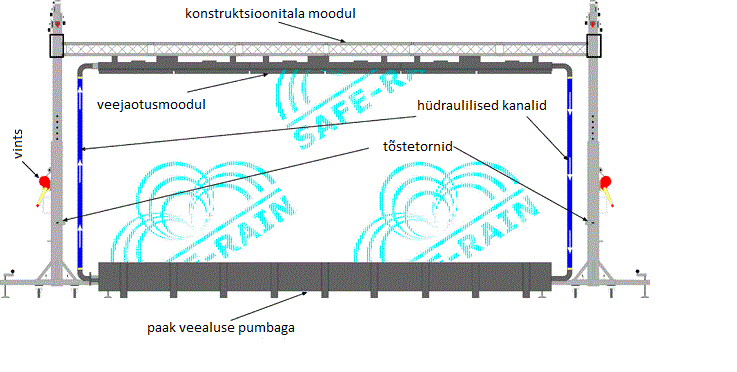 Komponendid